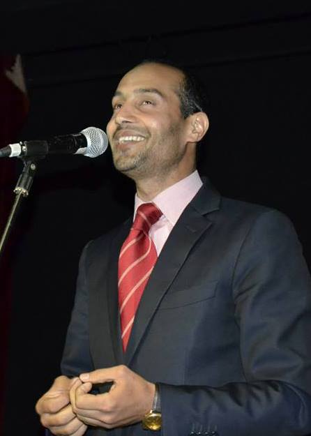 سهرة مع الجمال المحمدي للفنان نبيل نور